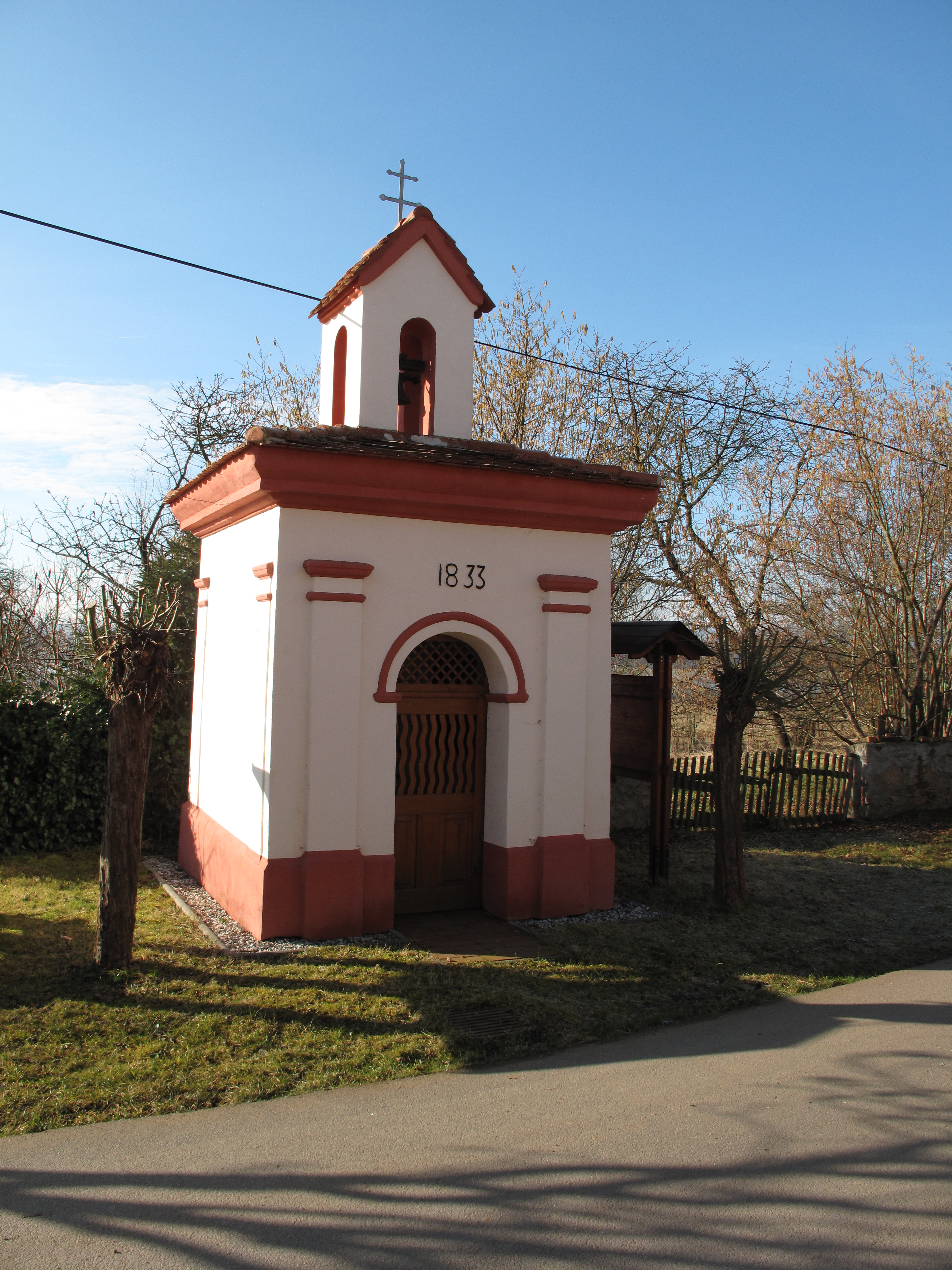 Kaplička ve Strpí. Okres Strakonice, Česká republika.